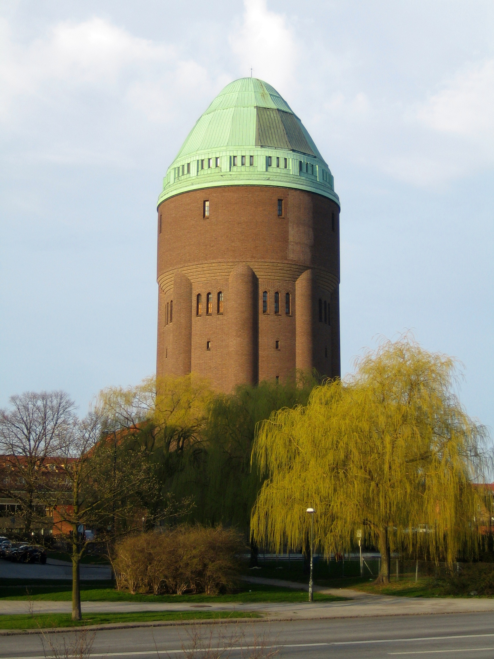 Old water tower at Södervärn in Malmö, Sweden.